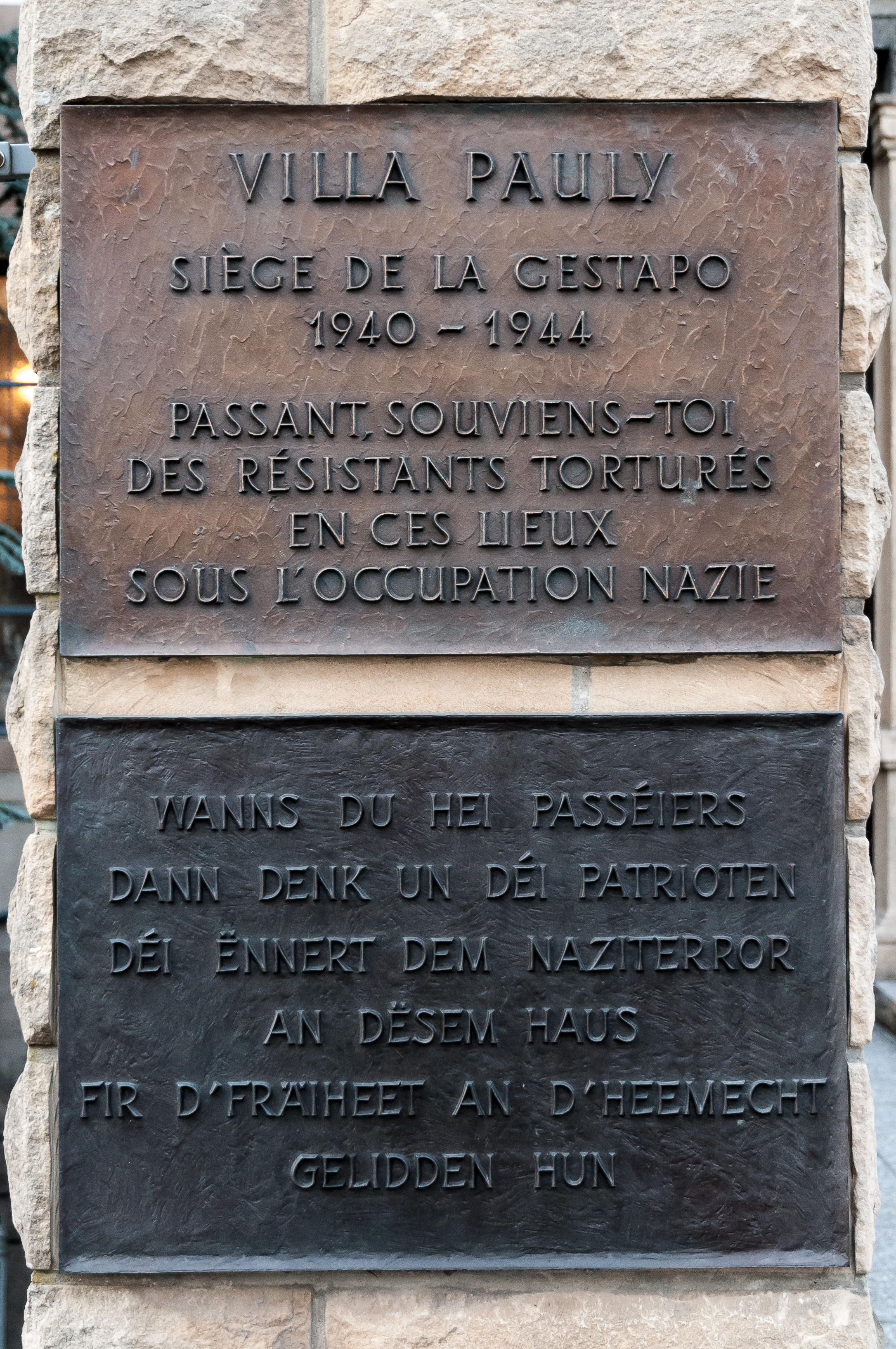 Baussen un der Entrée vun der Villa Pauly sinn zwou Gedenkplacken ubruecht.